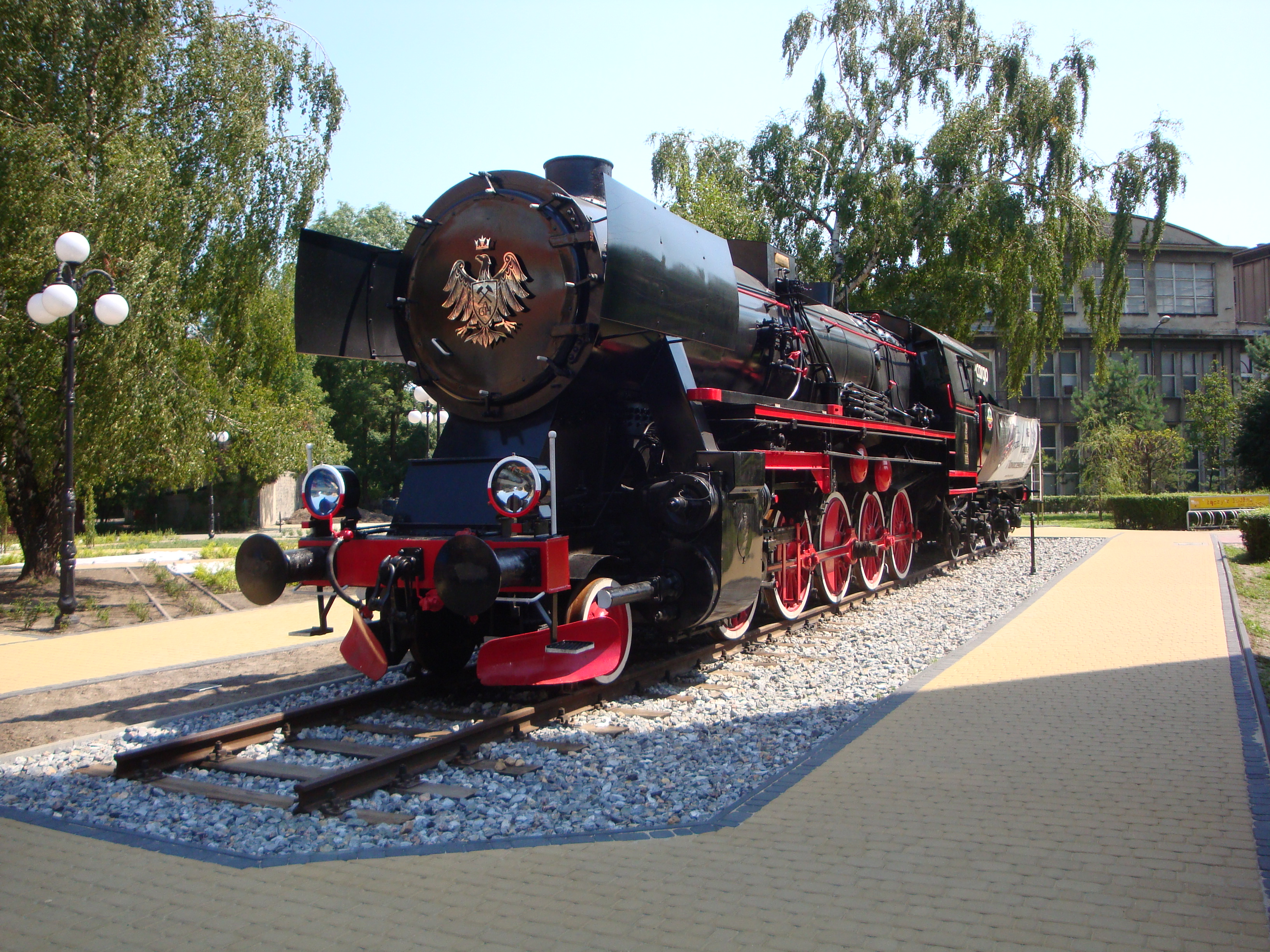 Parowóz Ty2 w kampusie AGH w Krakowie.